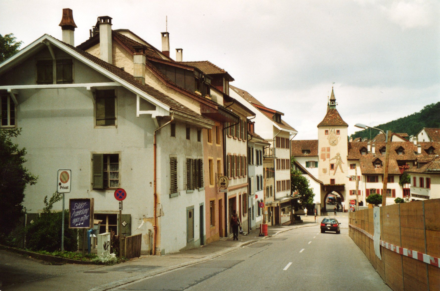 Törli, obere Vorstadt (Burg), Liestal